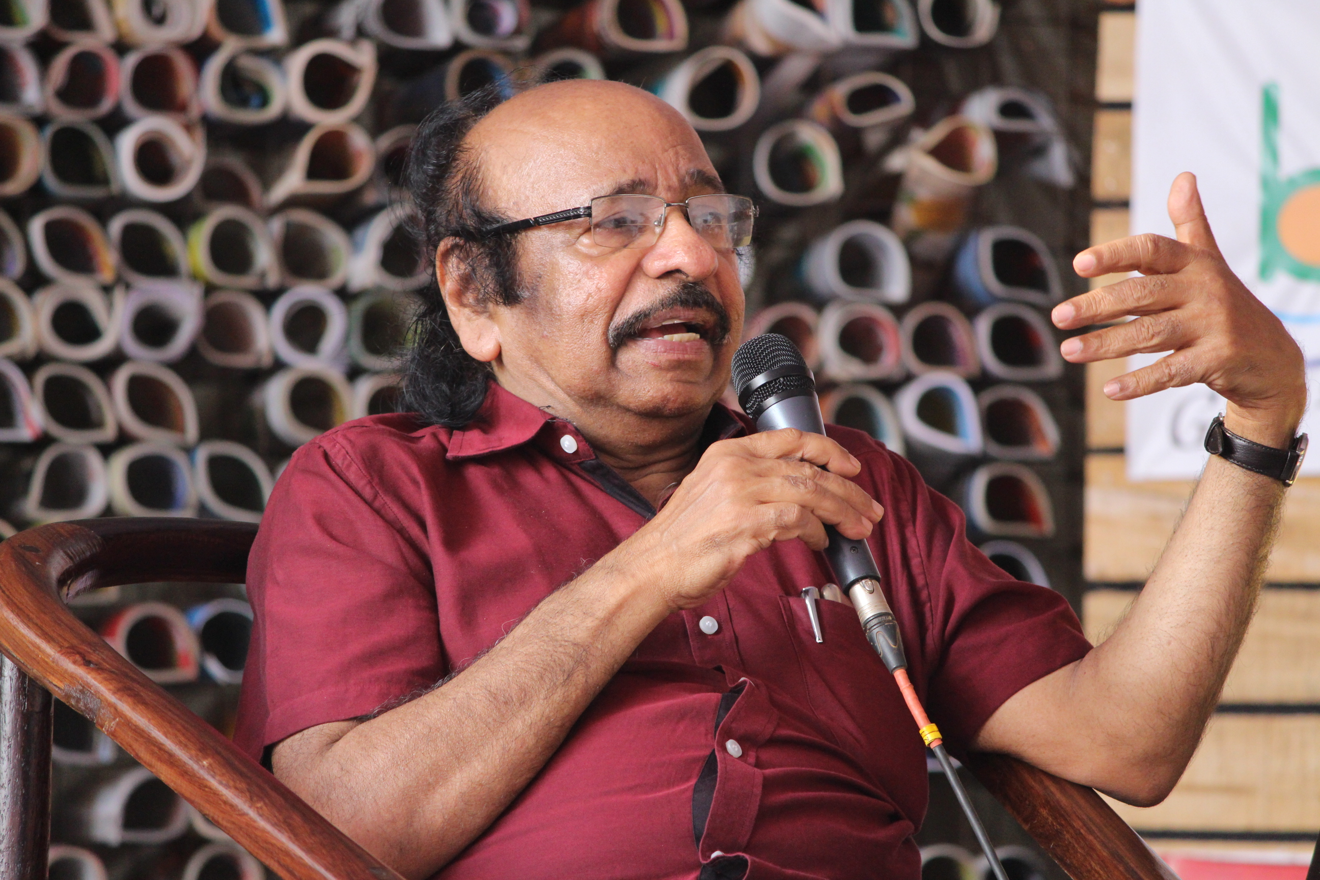 സച്ചിദാനന്ദന്‍ കേരളാ ലിറ്ററേച്ചര്‍ ഫെസ്റ്റിവല്‍ വേദിയില്‍ (കോഴിക്കോട്)